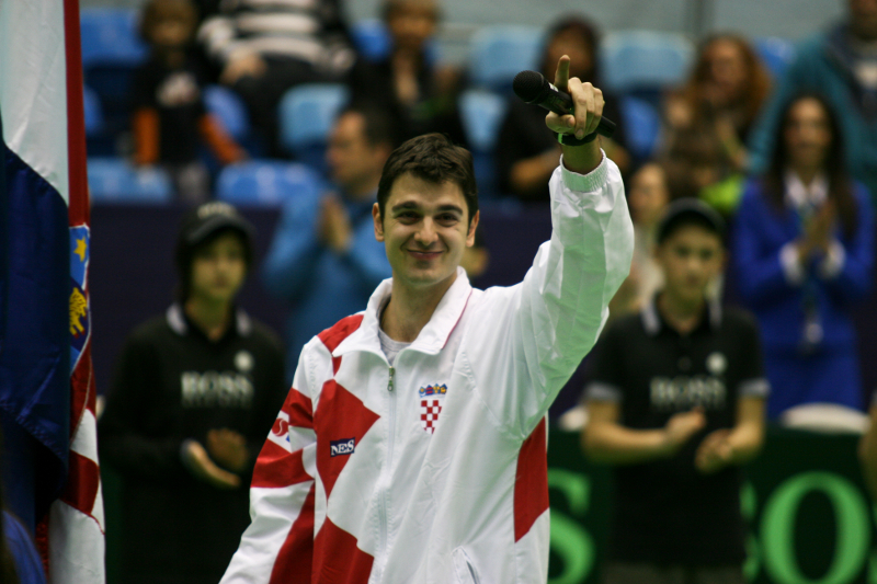 Mario Ančič oprašta se od reprezentacije i navijača nakon meča parova u susretu Davisova kupa u Zagrebu.